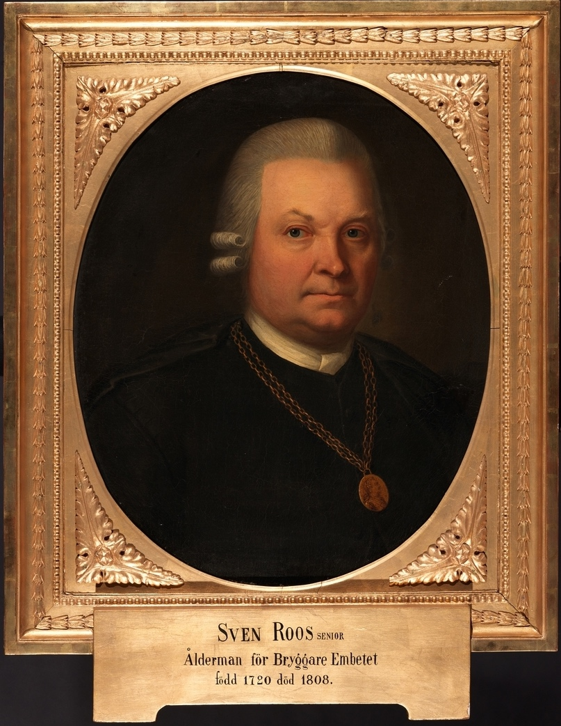 Porträtt av Sven Roos (1720-1808), iklädd svenska dräkten samt bärande runt halsen Gustav III:s faddertecken som han fick då han var fadder för Gustav IV Adolf 1778. Roos var ålderman för bryggareämbetet i Stockholm. Avporträtterad av okänd ca 1779.